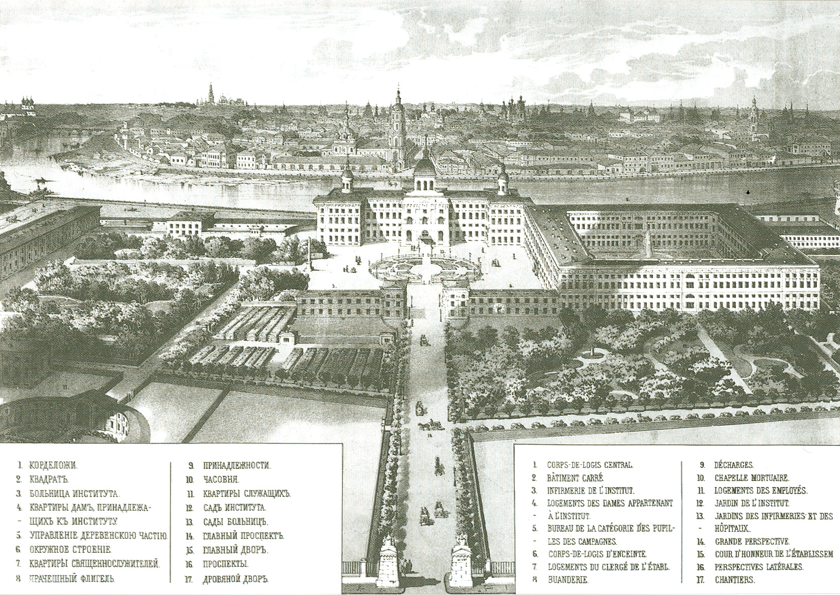 Воспитательный дом. 1820-е годы. ГНИМА.